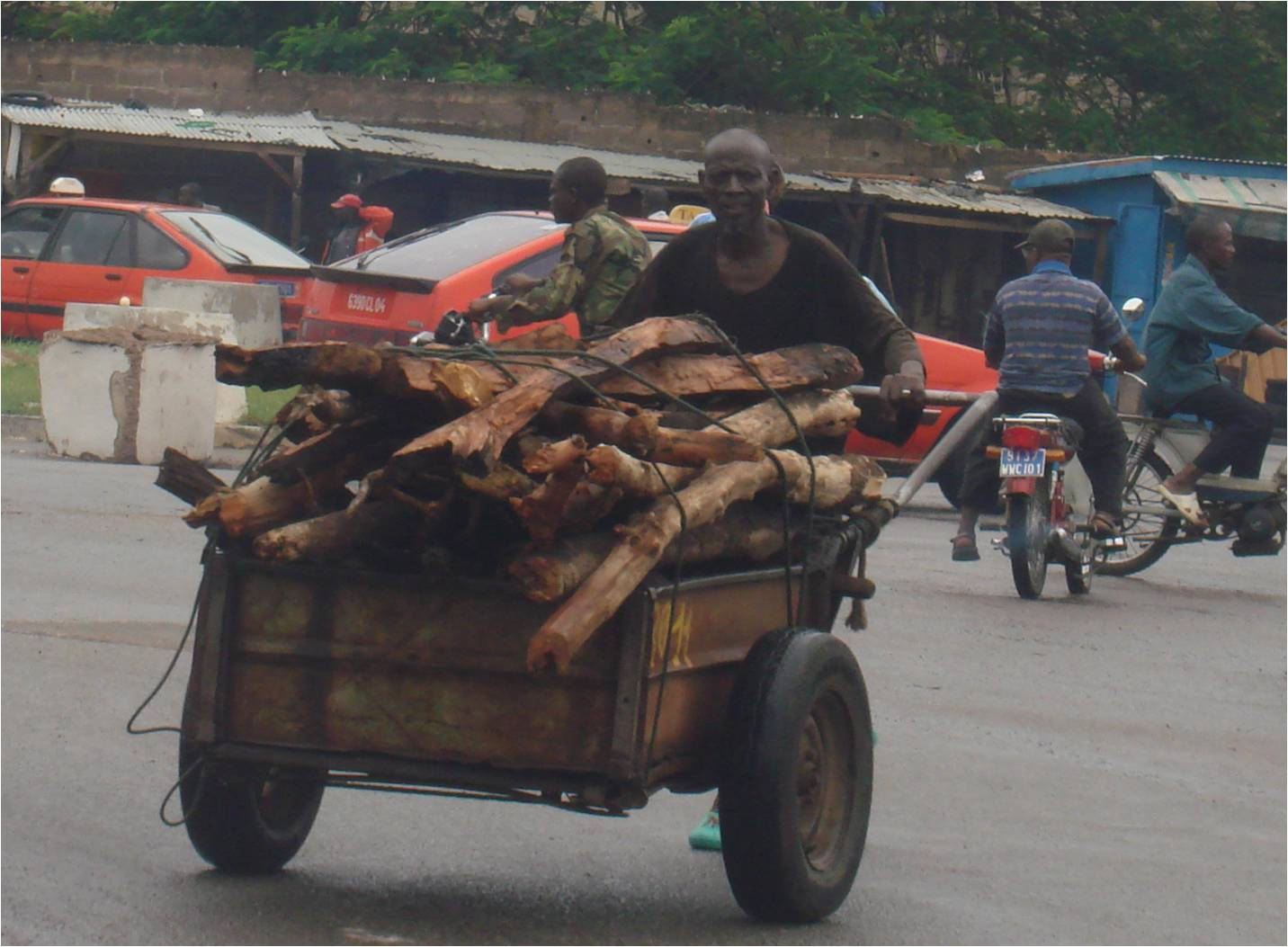 Charette de transport de matériel à Bouaké (Côte d'Ivoire)